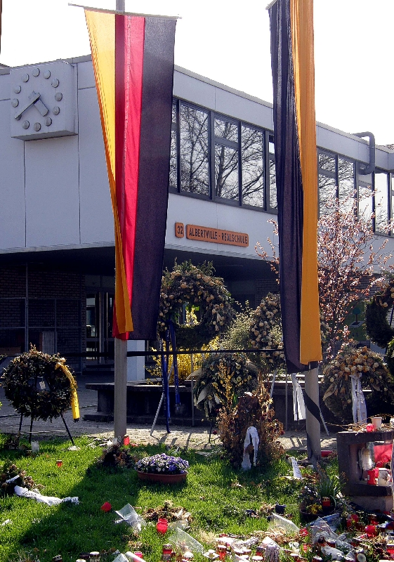 Bilder der Albertville-Realschule aus Winnenden